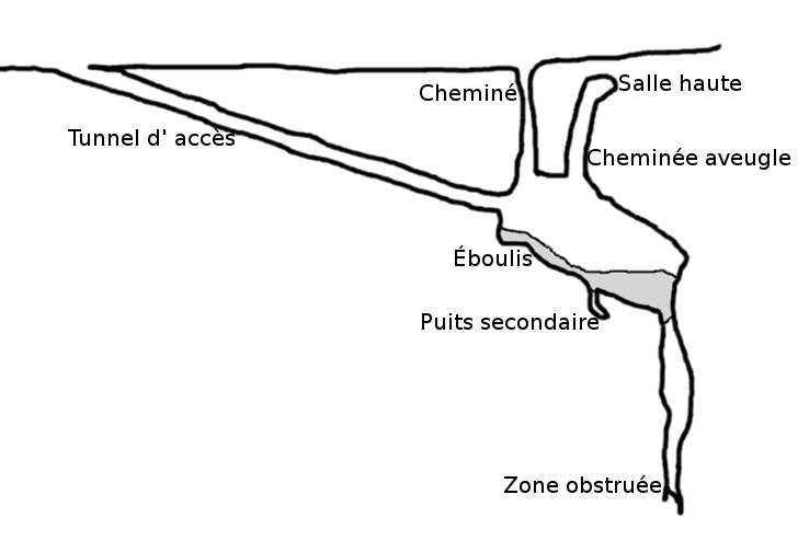 Querschnitt durch die Grotte von Aven Armand. Der heutige Eingang (franz. tunnel d'accès) ist auf der linken Seite.